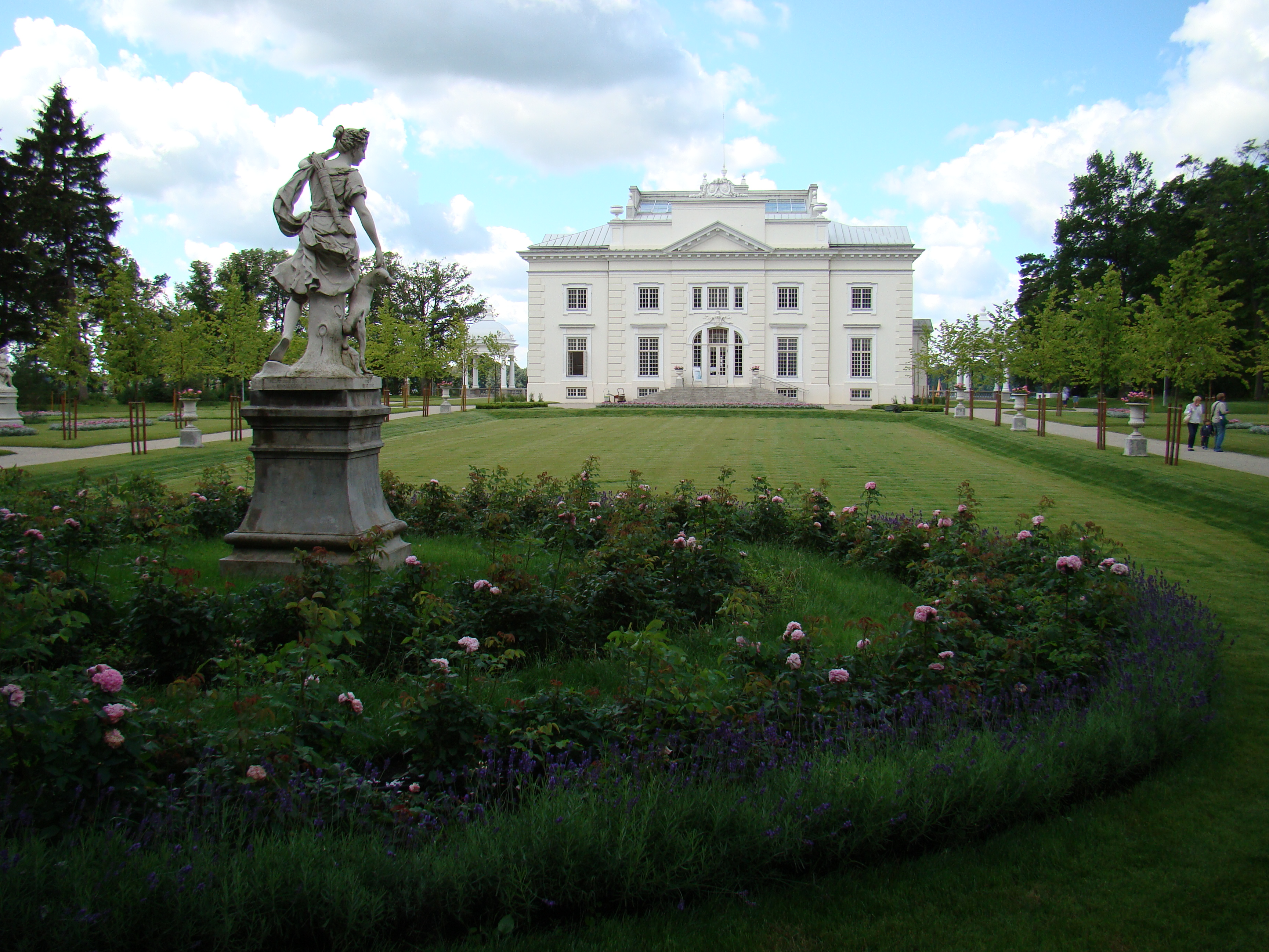 Užutrakio dvaro parkas